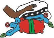 es el escudo del municipio de tlapacoyan